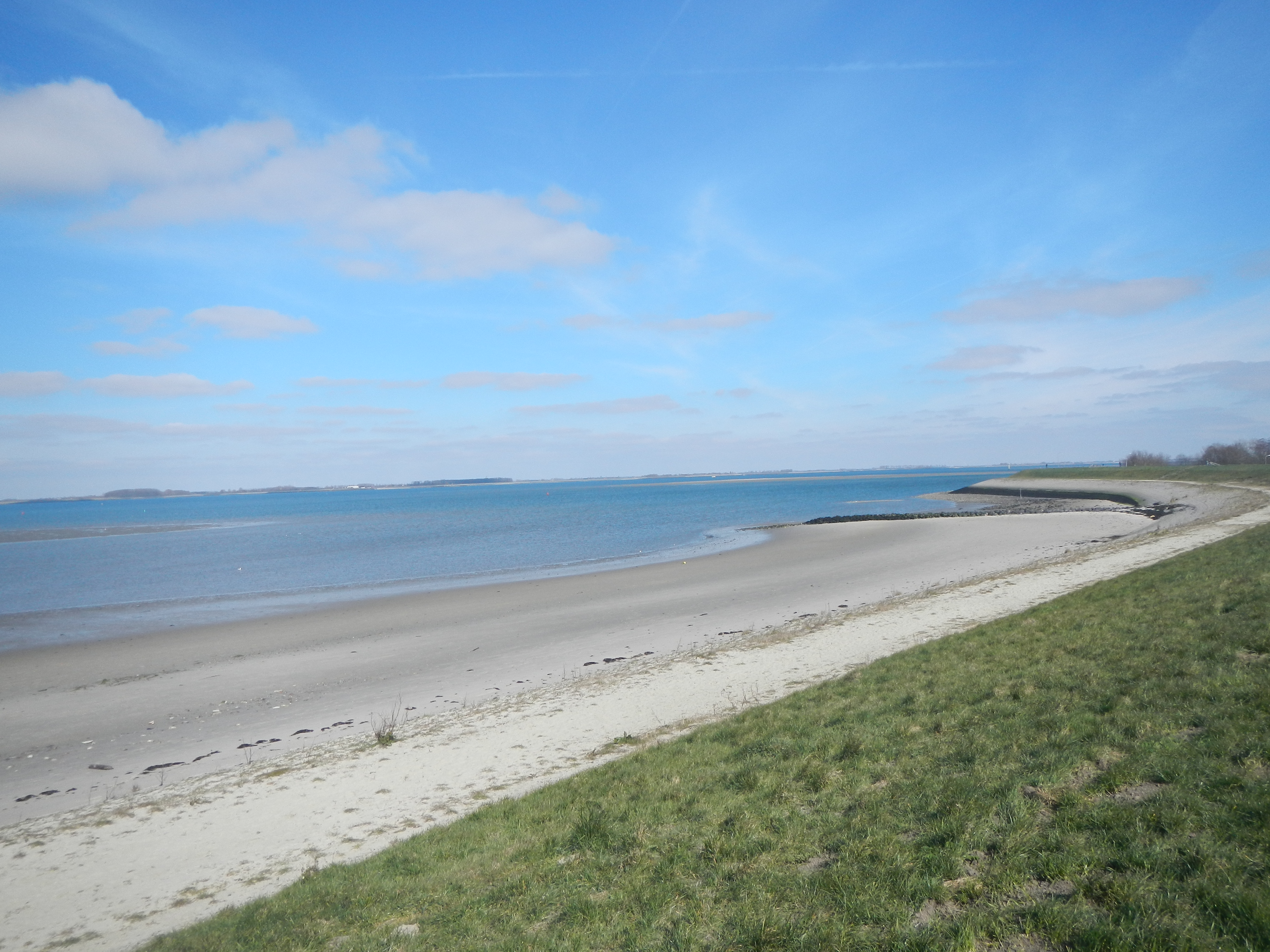 Zicht op de Westerschelde en het strand van Yerseke vanaf de dijk.